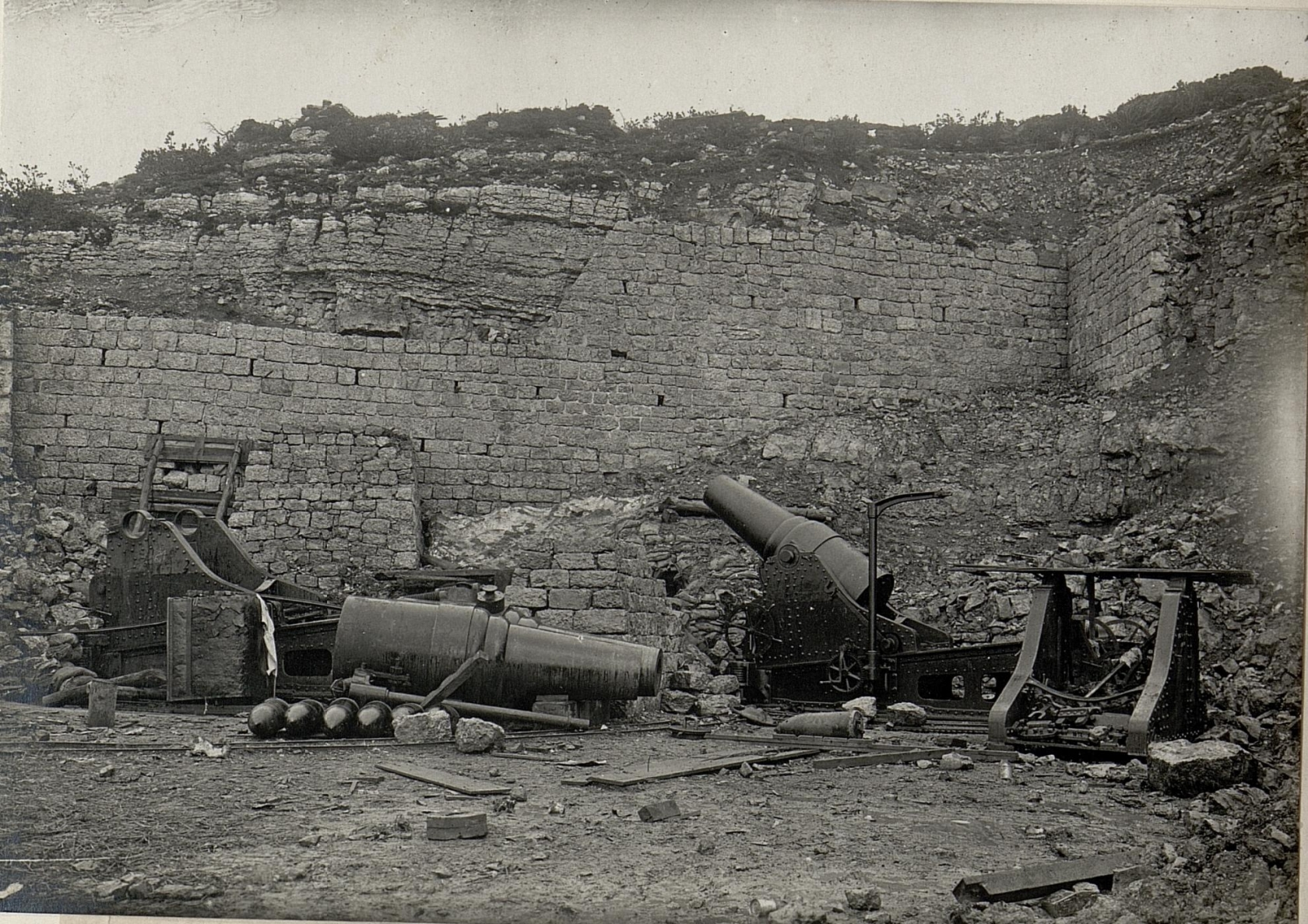 Eroberter italienischer 28 cm Mörser am Campomolon. Aufgenommen am 24. Mai 1916.